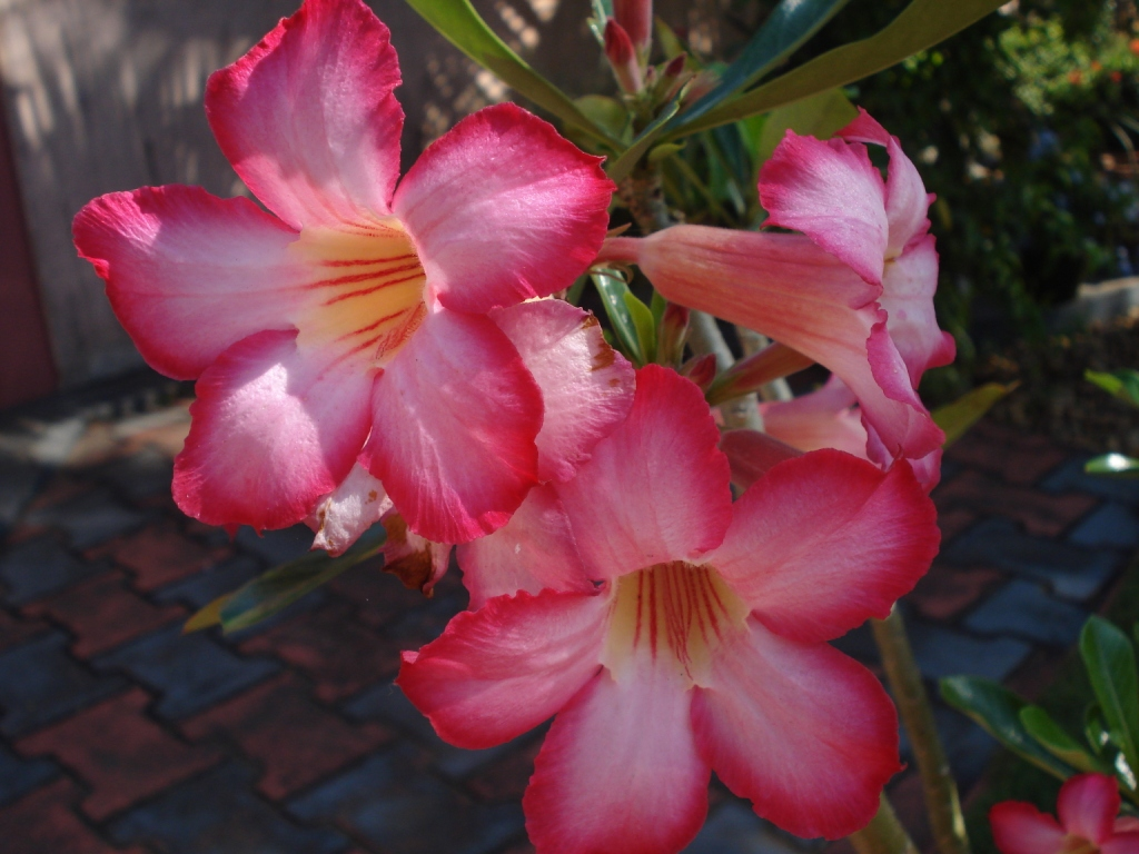 Adenium flower